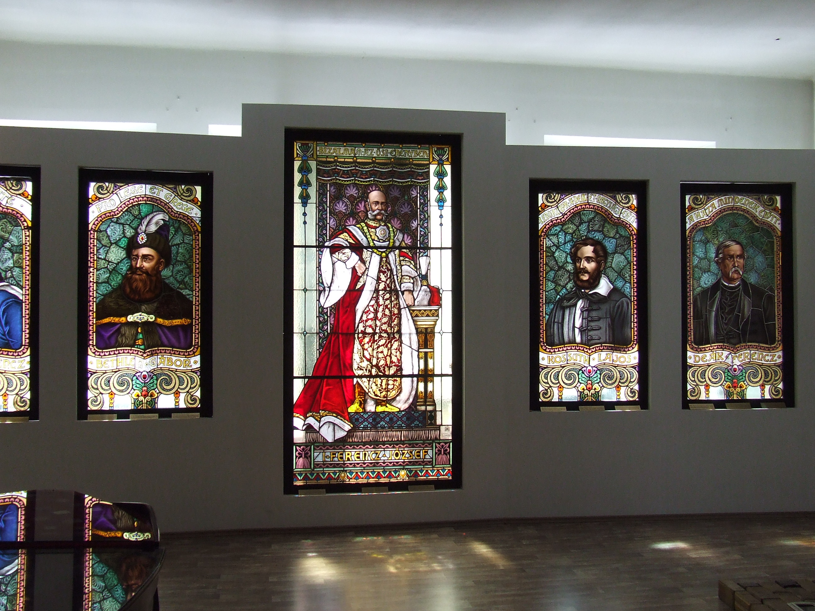 Marosvásárhely, Kultúrpalota